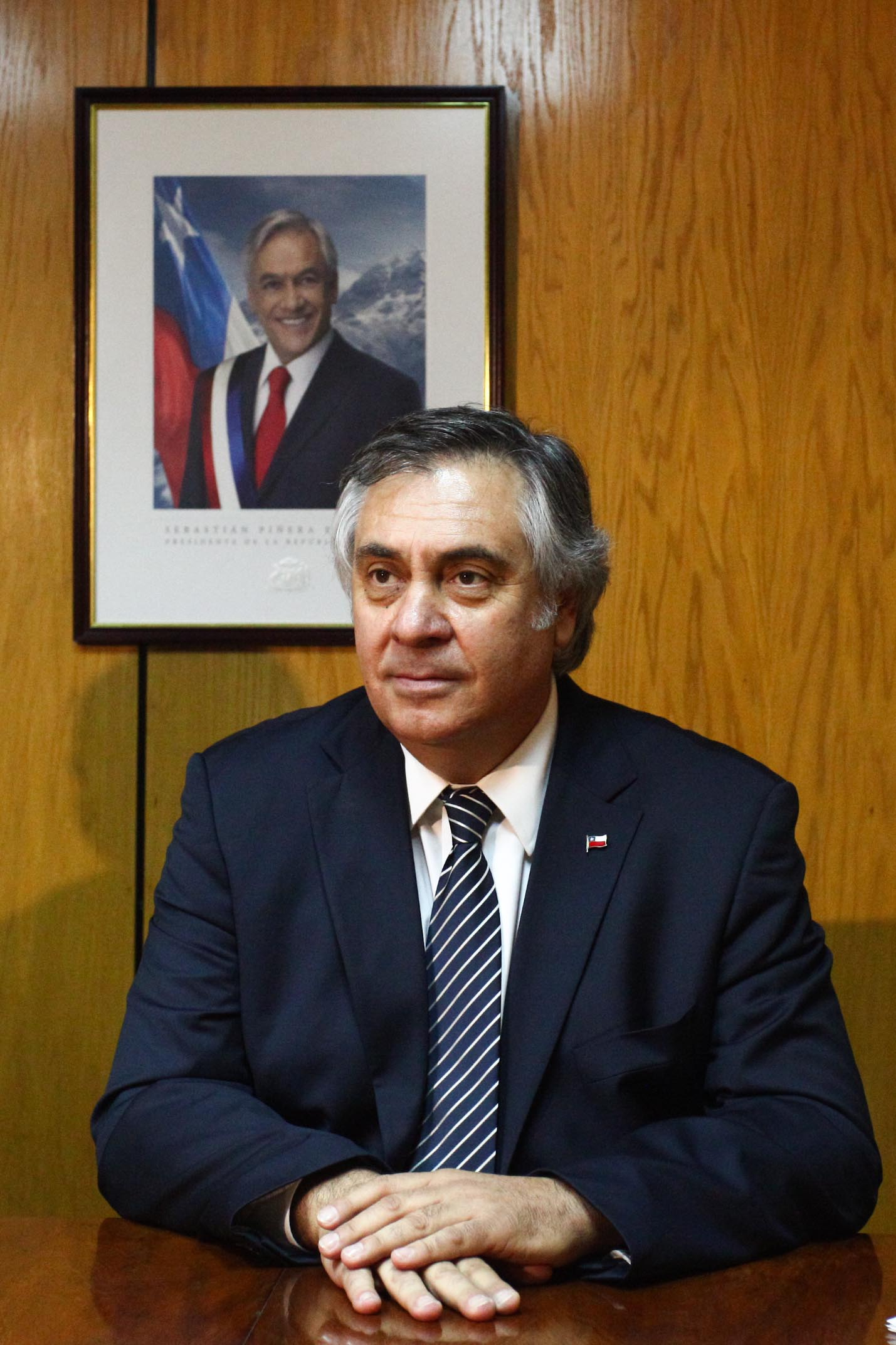 Rafael Prohens Espinosa, Intendente de la Región de Atacama.